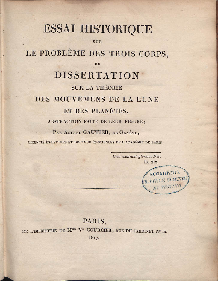 Essai historique sur le problème des trois corps, ou Dissertation sur la théorie des mouvemens de la lune et des planètes, abstraction faite de leur figure; par Alfred Gautier .... - A Paris : de l'imprimerie de Mme Ve Courcier, rue de Jardinet n. 12, 1817. - xij, 283, [1] p., [1] c. di tav. ripiegata : ill. ; 4º . Frontespizio